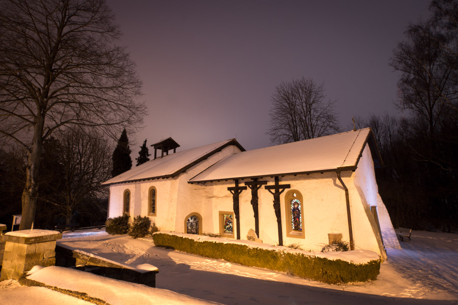 St.Oranna Kapelle Berus im Februar 2013